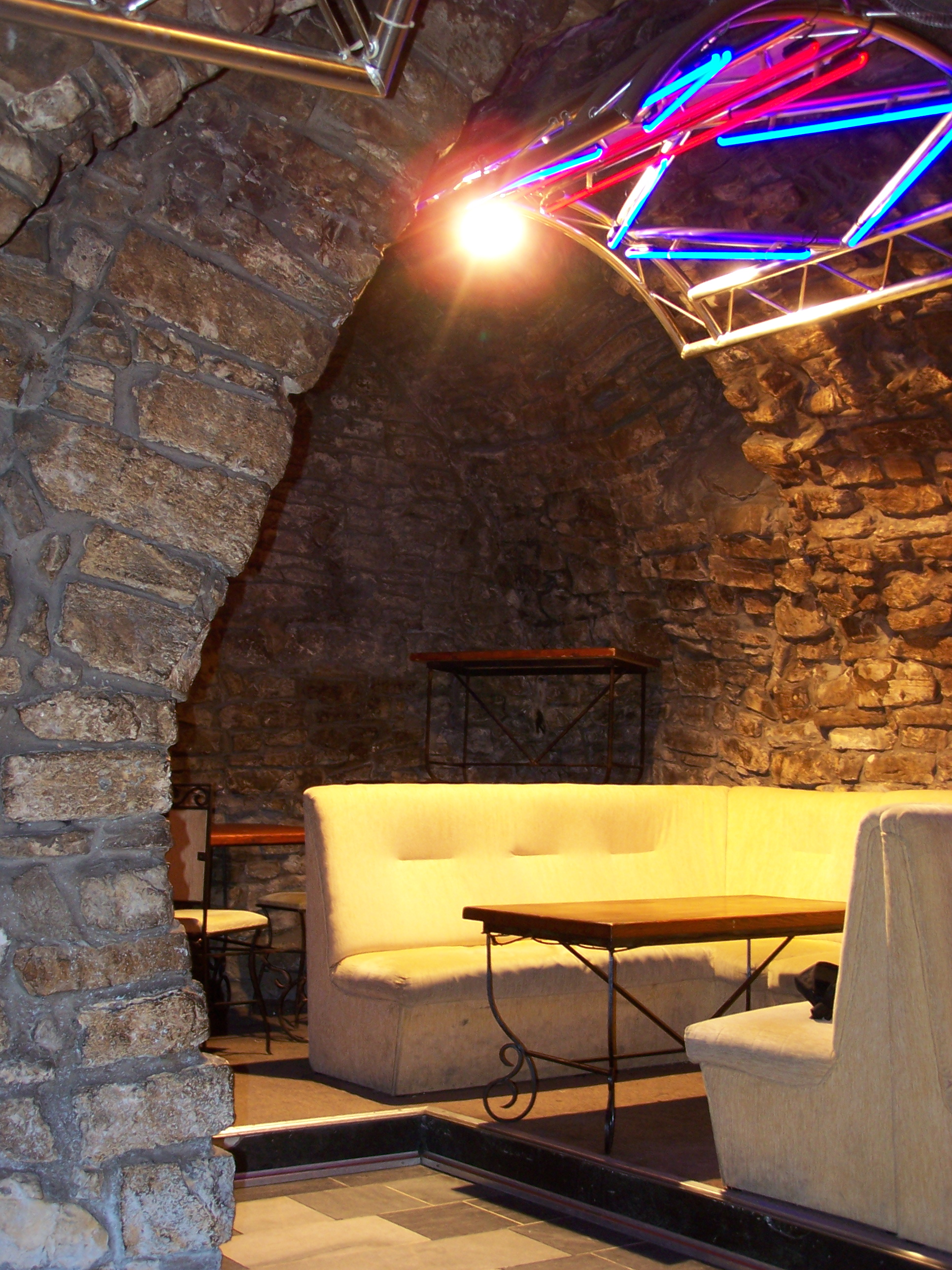 Wnętrza restauracji "Piwnica Gorywodów" w Bytomiu.